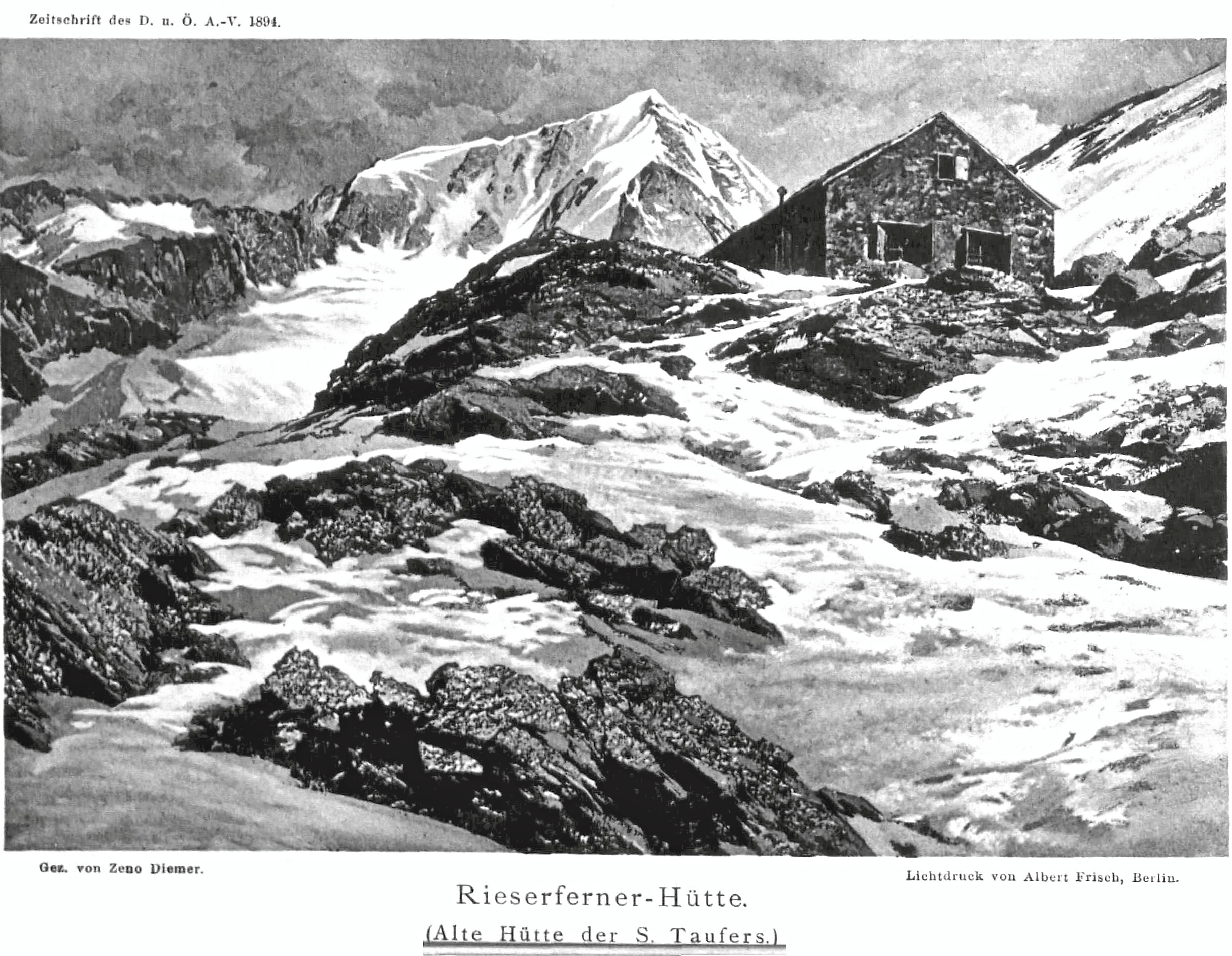 Rieserferner-Hütte (Alte Hütte der S. Taufers) aus Zeitschrift des Deutschen und Oesterreichischen Alpenvereins 1894 Band 25